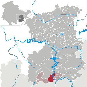 Harra in Thuringia - Saale-Orla-Kreis